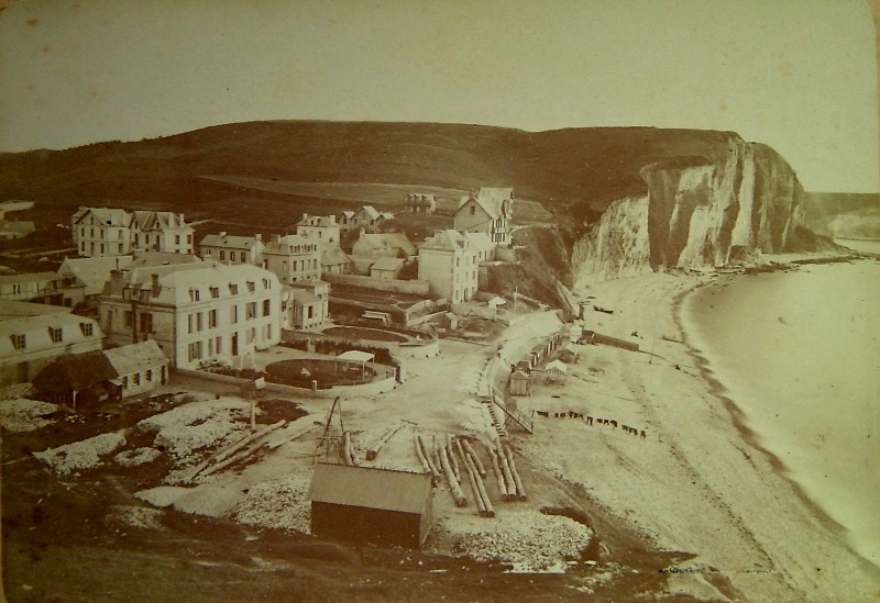 Les Petites Dalles, la plage et le bord de mer, Papier albuminé, photographie vers 1875. Au cente, la dernière maison en bord de mer est la villa Brise Lames d'Henri Wallon. Photographe inconnu.